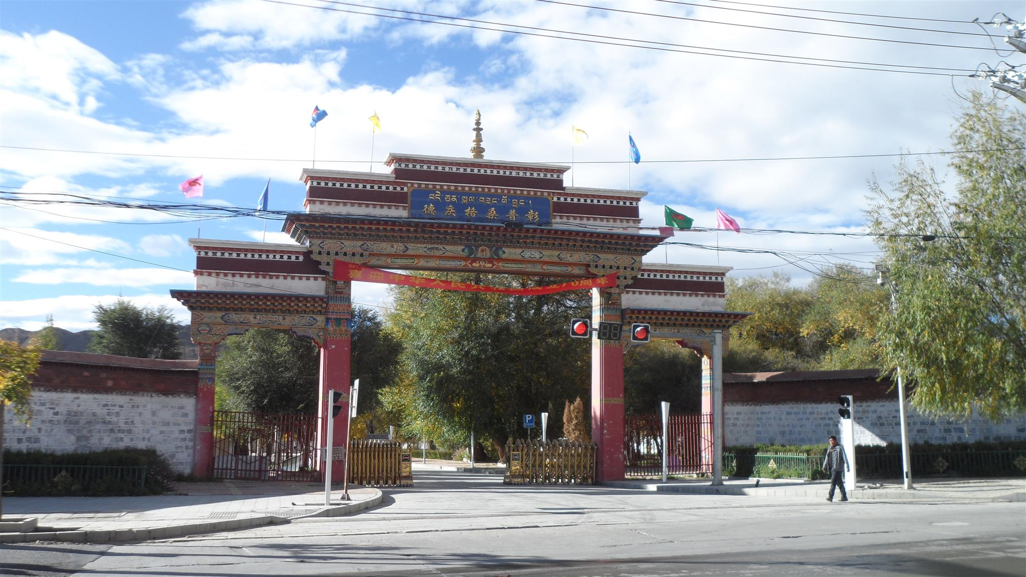 日喀则班禅新宫